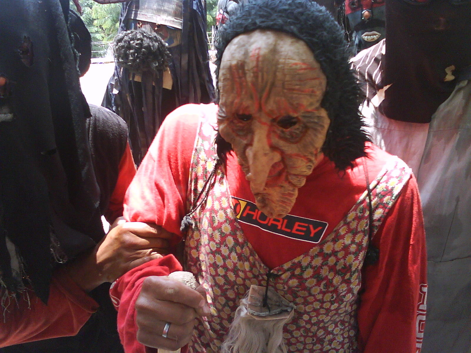 Mascara usada por los judios del pavon.